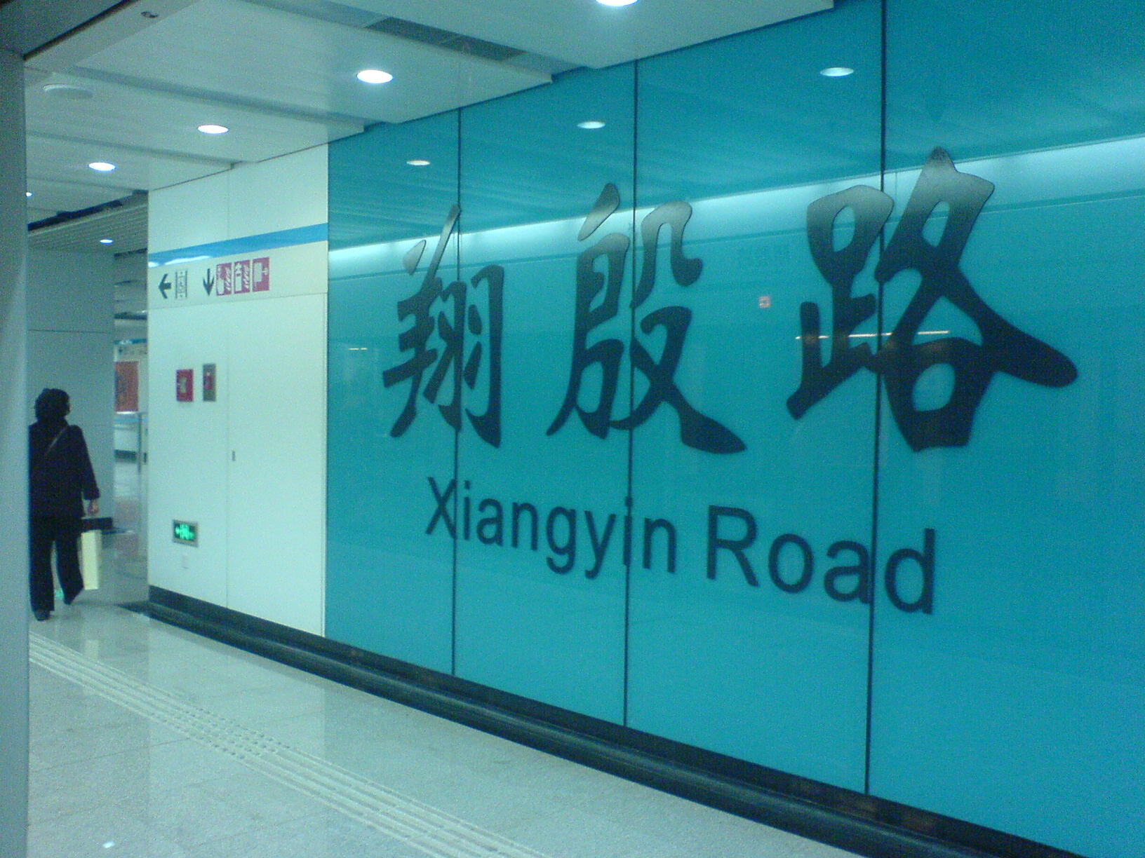 翔殷路站站台